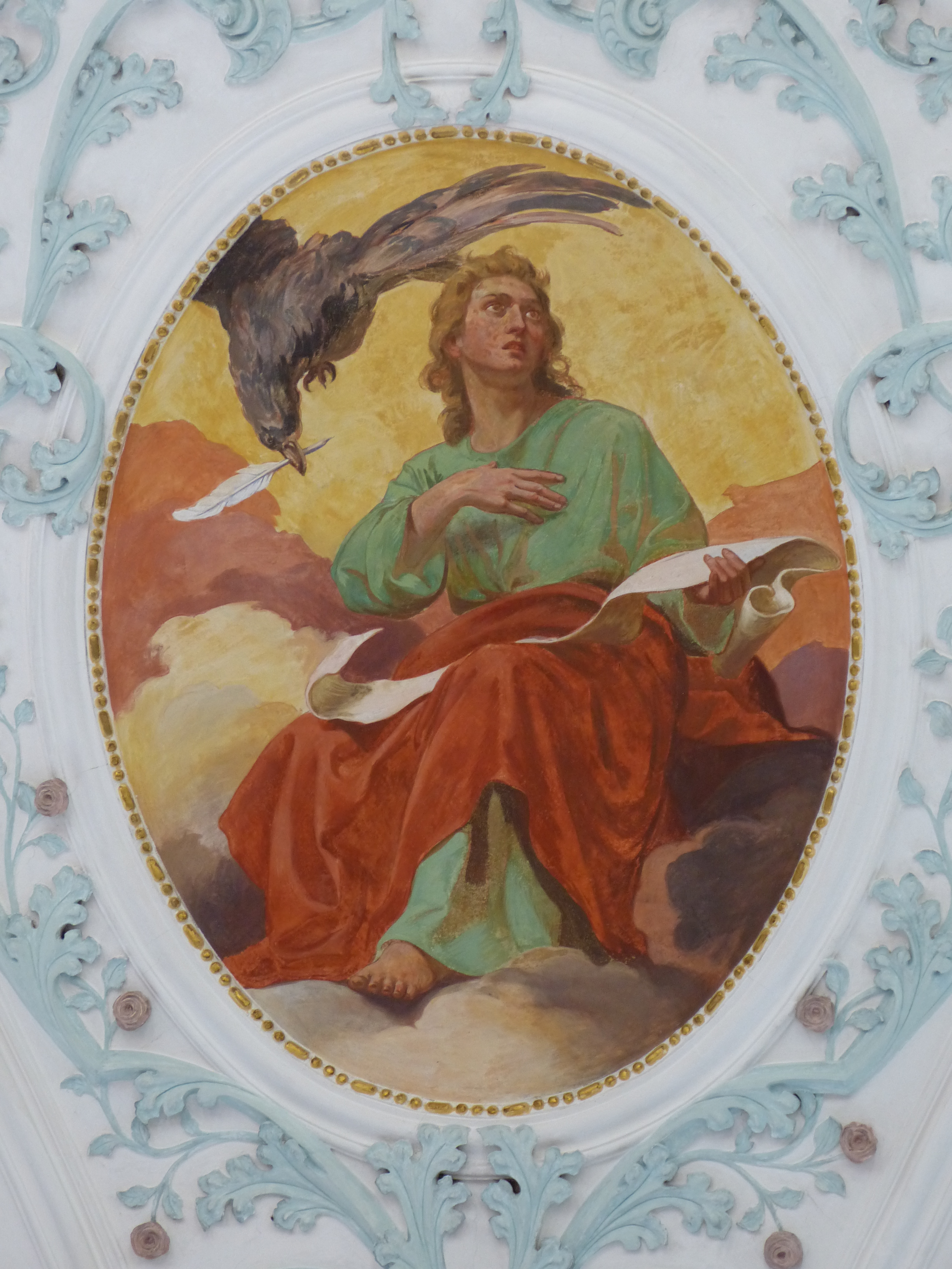 St. Georg, Kirch-Siebnach bei Ettringen, Landkreis Unterallgäu, Bayern, Deutschland